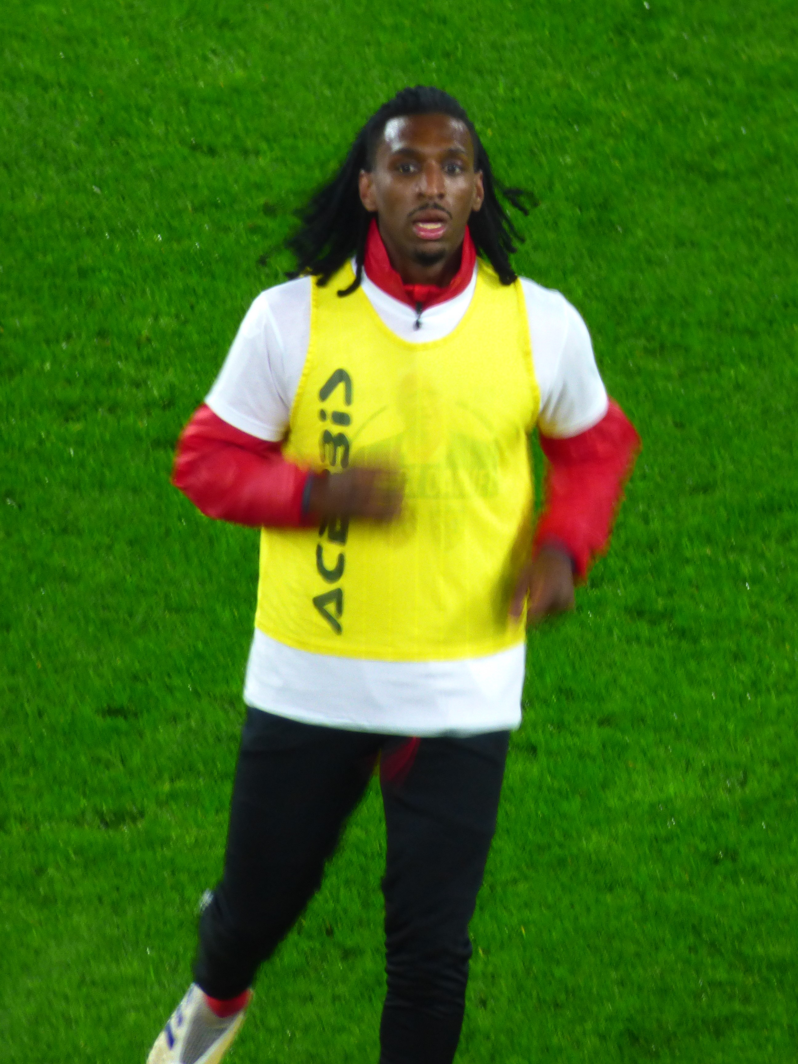 Sessi D'almeida avant le match Valenciennes FC / RC Lens, comptant pour la seizième journée du championnat de France de football de Ligue 2 2019-2020, le 29 novembre 2019.